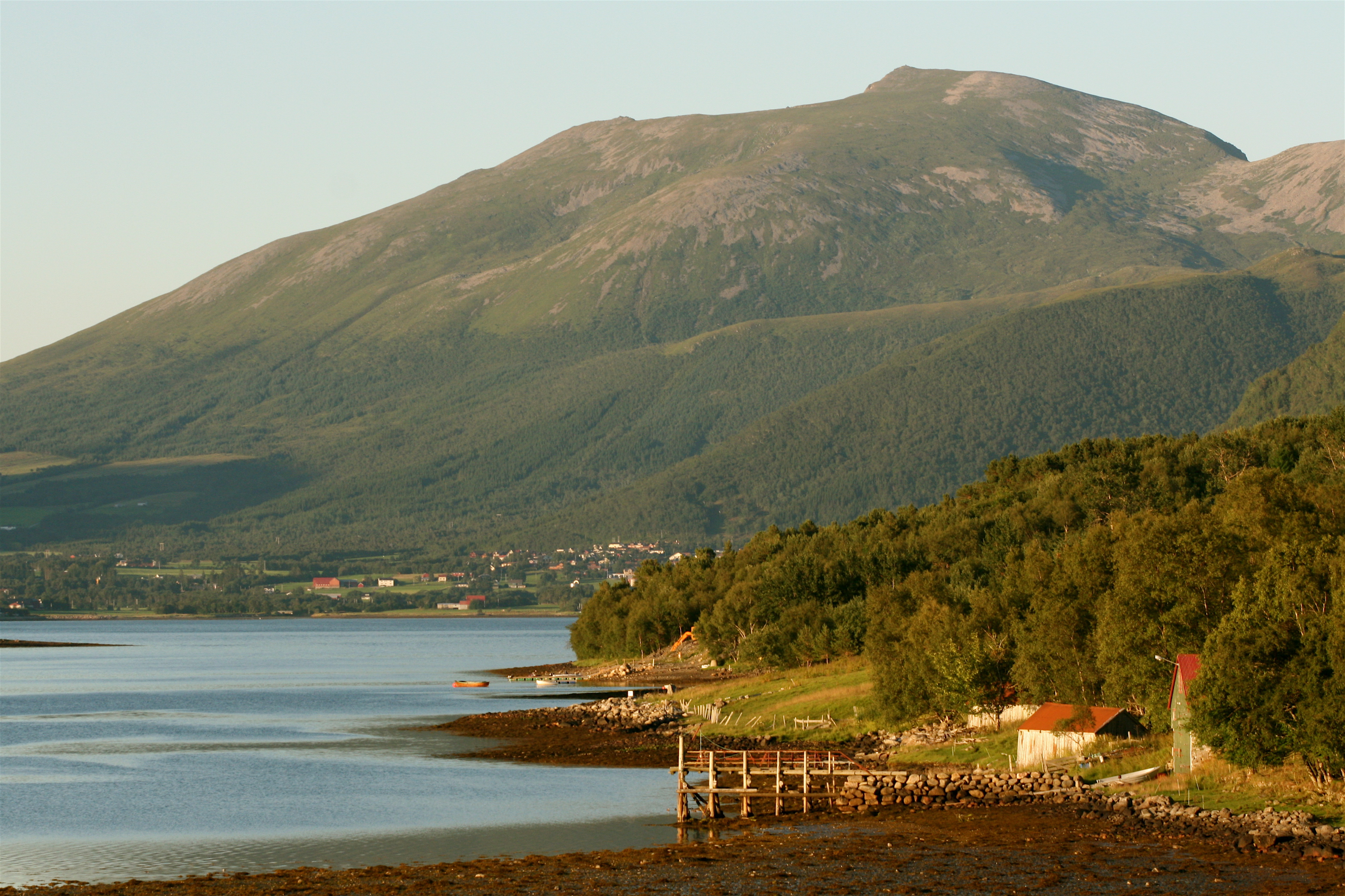 Aureosen